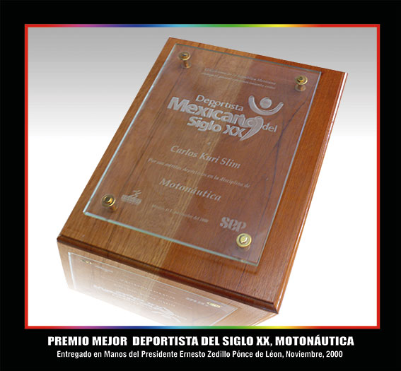 Premio Deportista Mexicano del Siglo XX, en Motonáutica